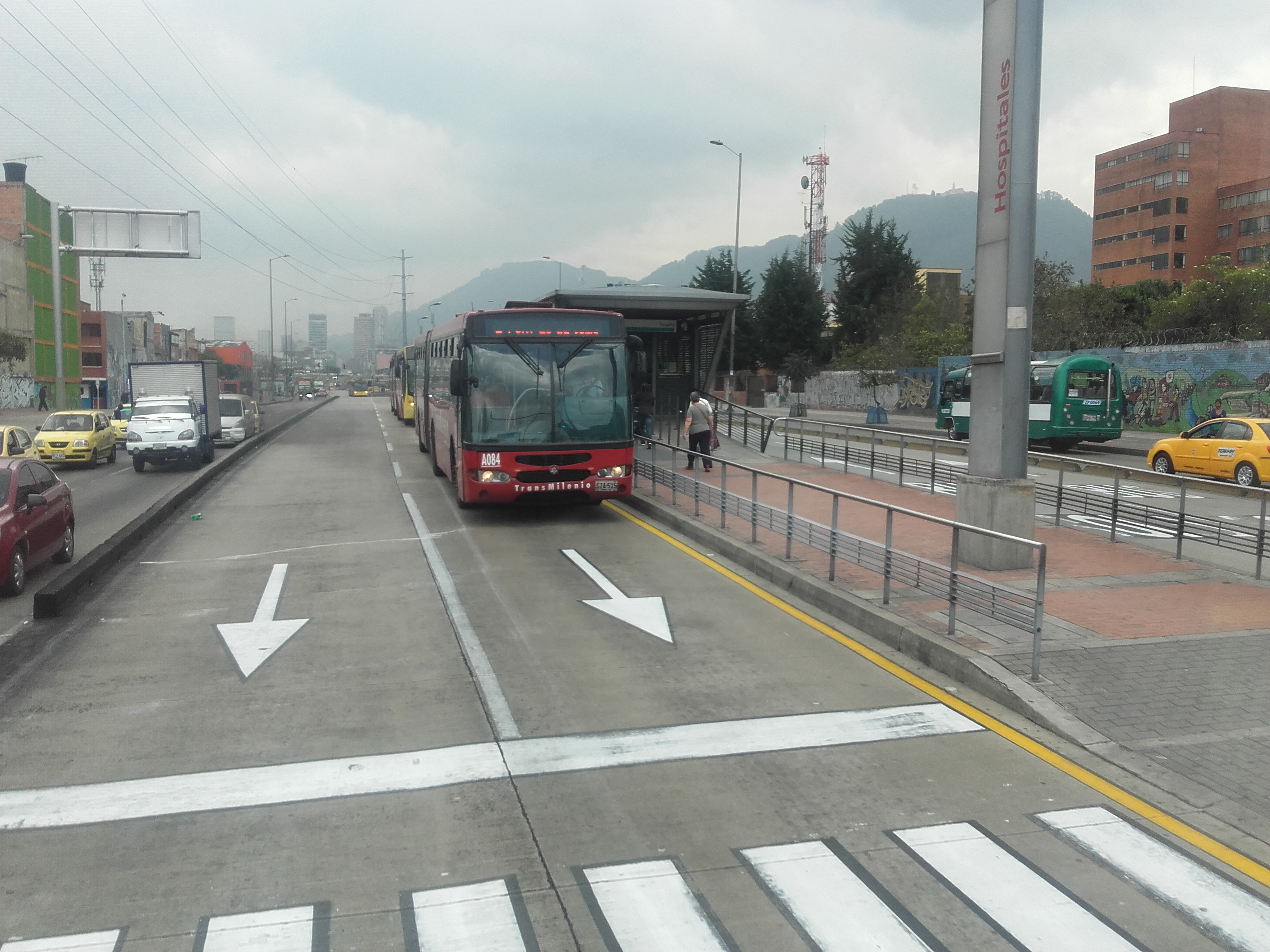 fngngngnnvvmcncmvn